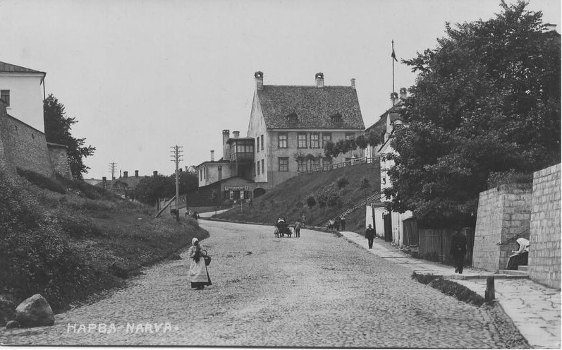 Hermanni tänav Narvas